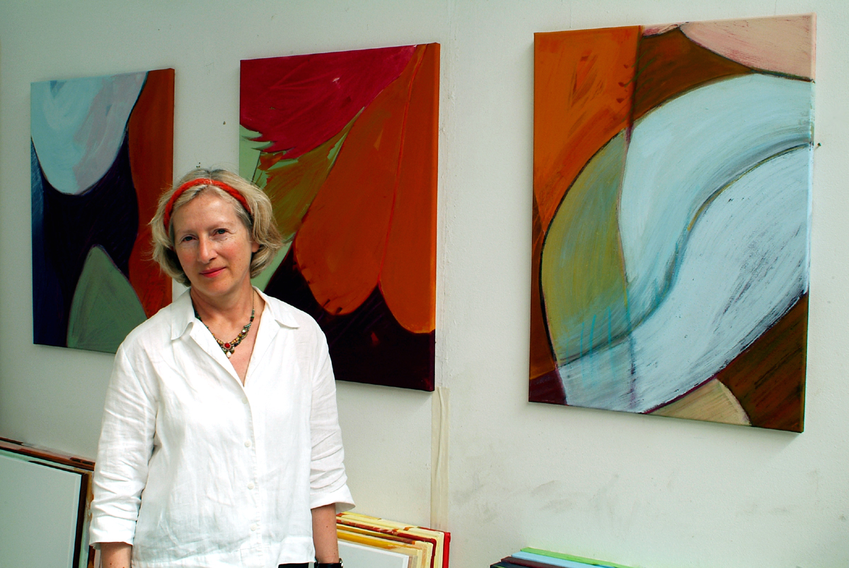 Die Künstlerin Angelika Wolf vor einigen ihrer Arbeiten, hier im Atelier Block 16 in Hannover Nordstadt, beim Zinnober-Kunstlvolkslauf 2012 ...